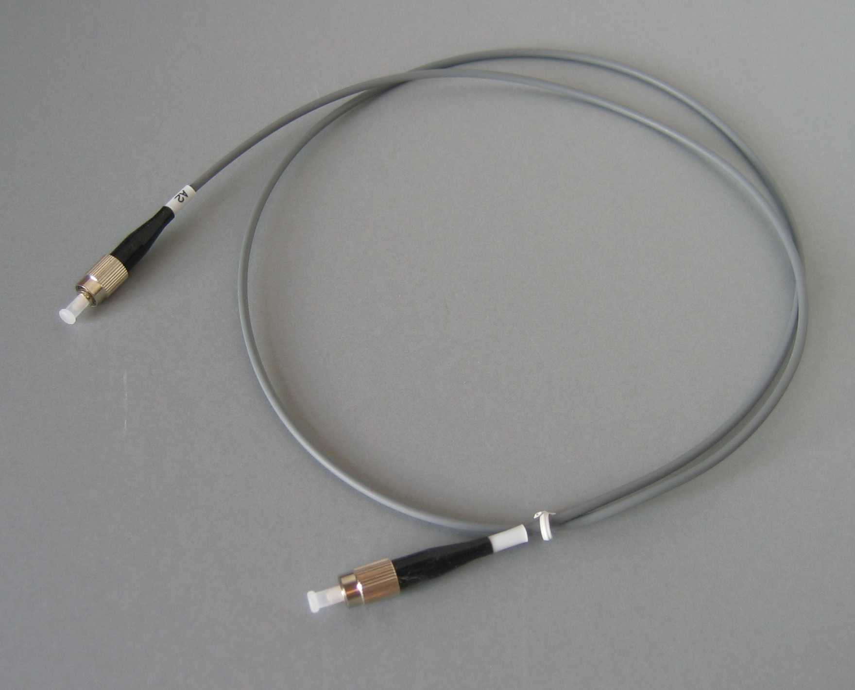 Fibre cable